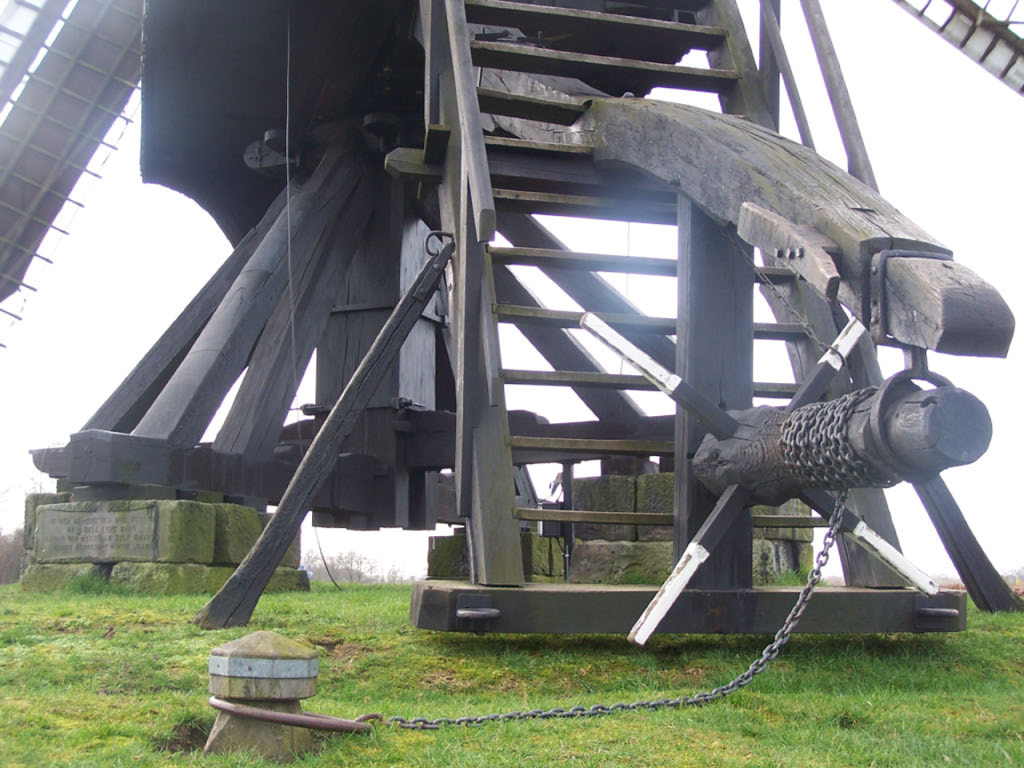 Picture Wissinks Möl (Windmill in Usselo, Enschede, Netherlands)